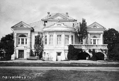 Фотография "барского дома" в Горожанке (Рамонский район, Воронежская область) в конце 19 - начала 20 века.